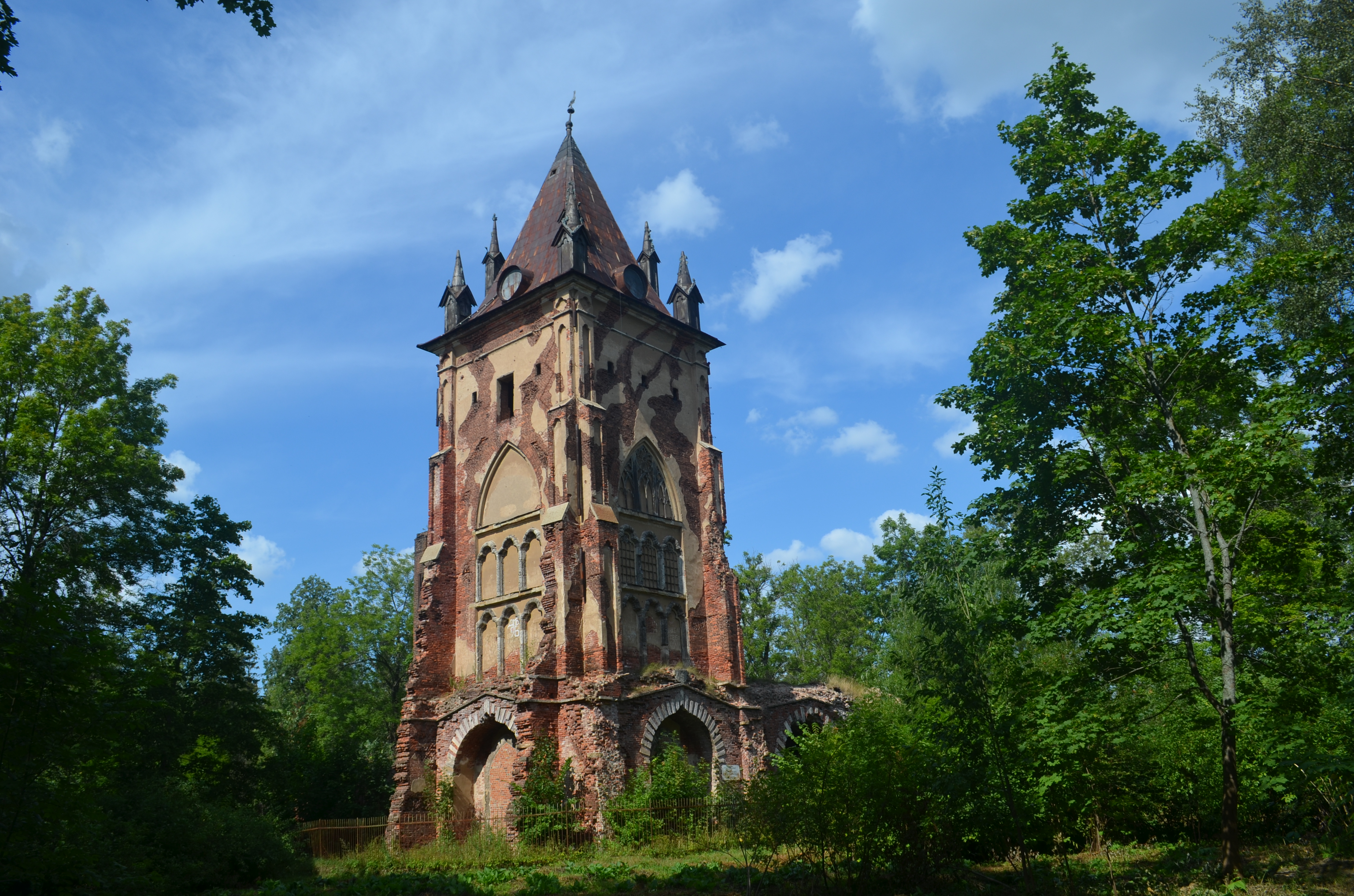 Павильон «Шапель» (Санкт-Петербург и Лен.область, Пушкин, близ Китайской деревни)